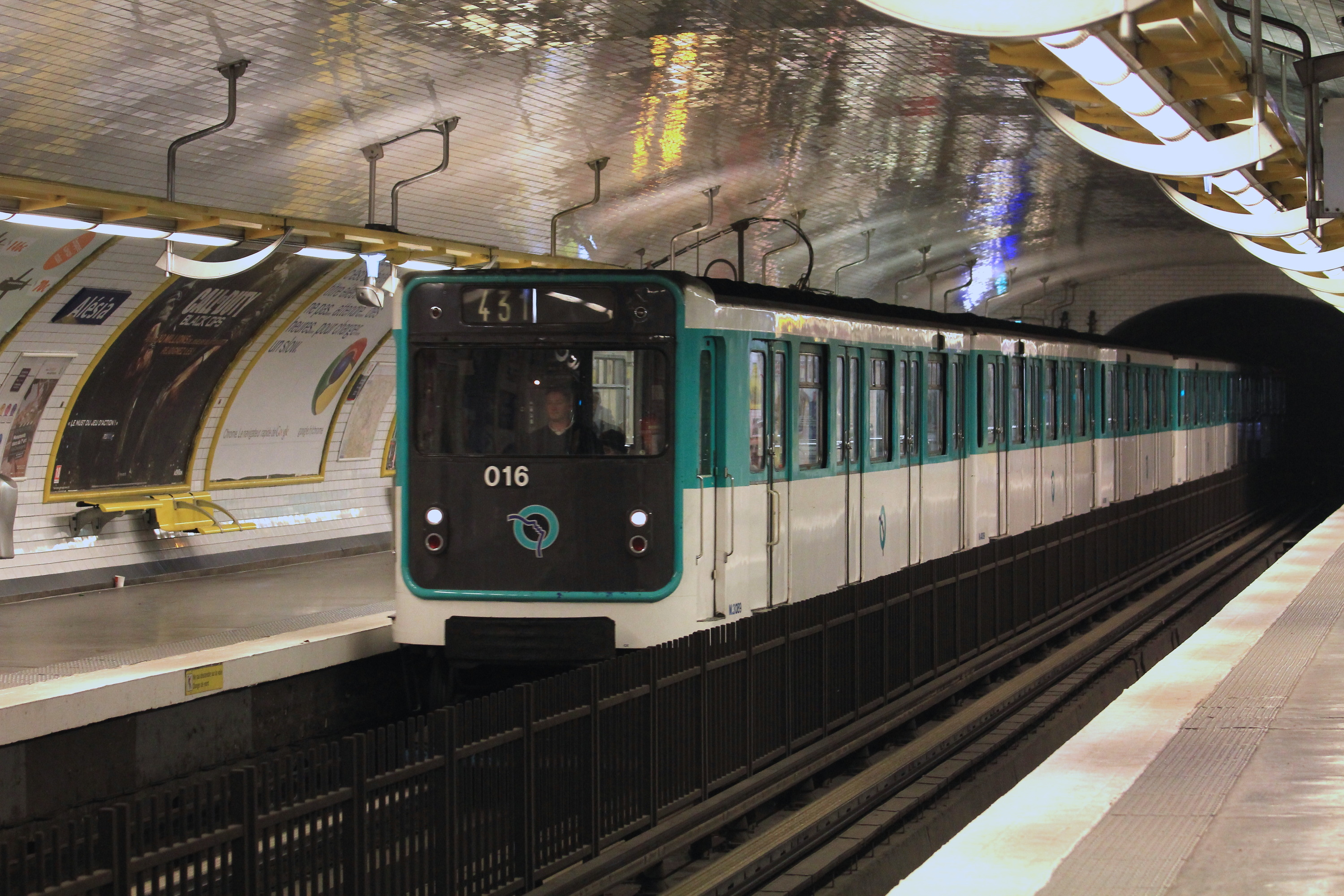 Un métro de type MP 59 à destination de la Porte de Clignancourt entre dans la station Alésia de la ligne 4 du métro parisien.